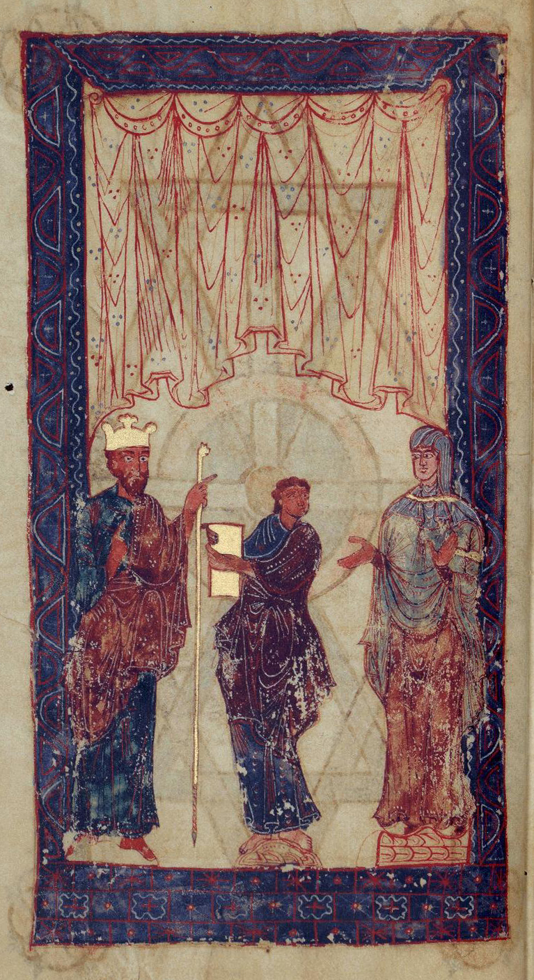 Sancha I e o seu consorte Fernando I, reis de Galiza (1037-1065), reciben o libro.